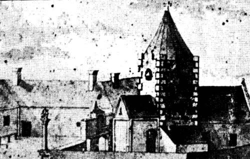 Podersdorf altKirche